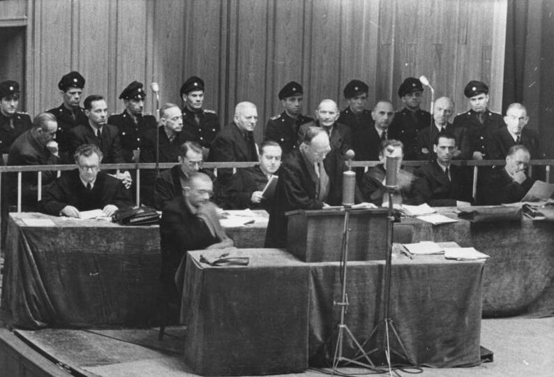 Dessau, Herwegen-Prozeß ADN-ZB/Illus-Paalzow Herwegen-Prozess in Dessau. Schlußphase und Urteilsverkündung im Dessauer Millionenschieber-Prozeß am 29.04.1950 vor dem ersten Strafsenat des Obersten Gerichts der Deutschen Demokratischen Republik im Landestheater Dessau gegen den ehemaligen Minister für Arbeit und Sozialwesen in Sachsen-Anhalt, Dr. Leo Herwegen und seine Mitangeklagten wegen Sabotage der Überführung des Konzerns der Deutschen Continentalen Gasgesellschaft in das Eigentum des deutschen Volkes. Den Prozeß führte die Vizepräsidentin des Obersten Gerichts Hilde Benjamin. UBz Blick auf die Anklagebank während des Plädoyers des Verteidigers des Angeklagten Dr. Leo Kaatz. 6.5.50 [Herausgabedatum] 6428-50 Abgebildete Personen: Melsheimer, Ernst Dr.: Generalstaatsanwalt, DDR (PND 133606783)